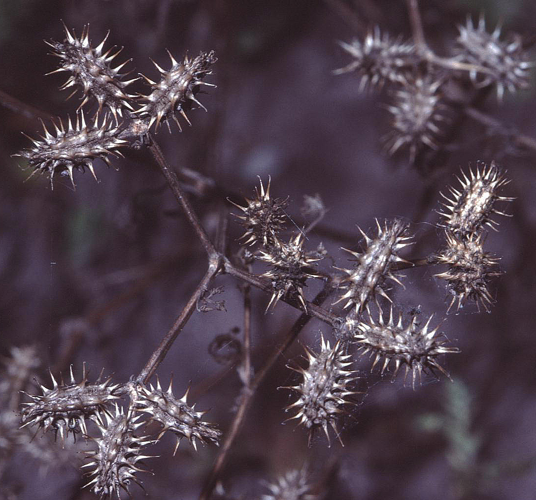 Caucalis platycarpos in Unterfranken